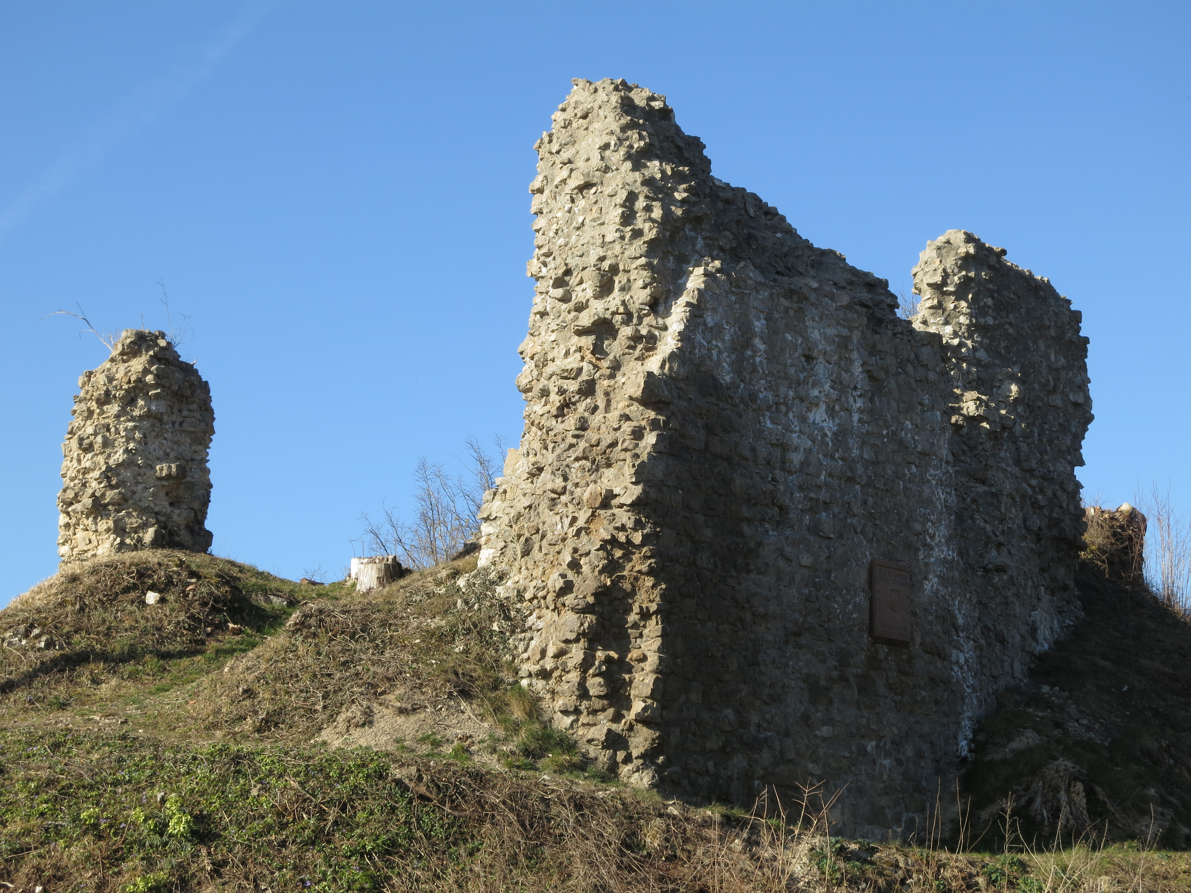 Burgruine Schenkenberg (Schenkenburg) oberhalb des Neckartals.